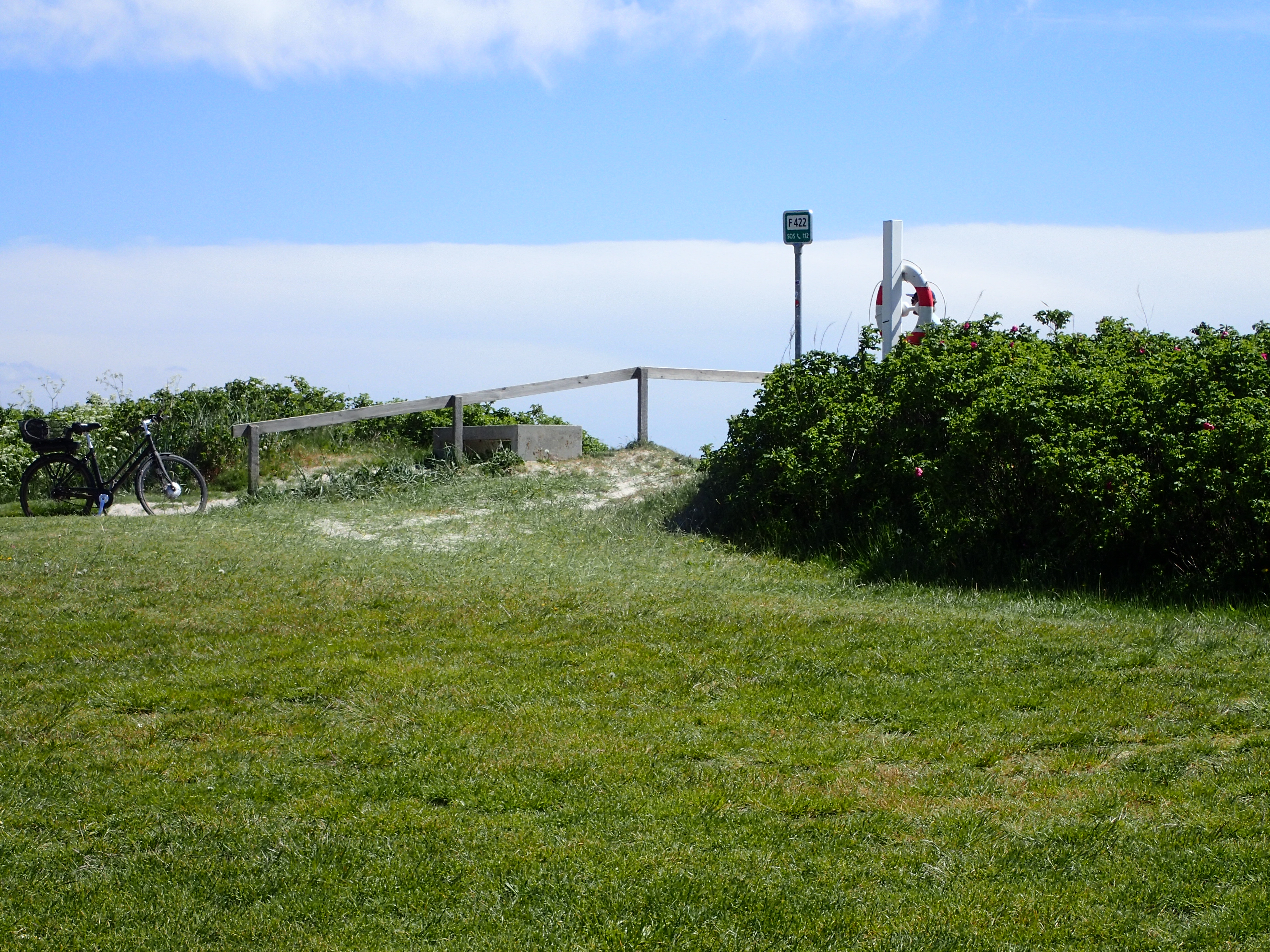 Bellevue i Aarhus. En af trapperne fra strandparken til selve stranden.